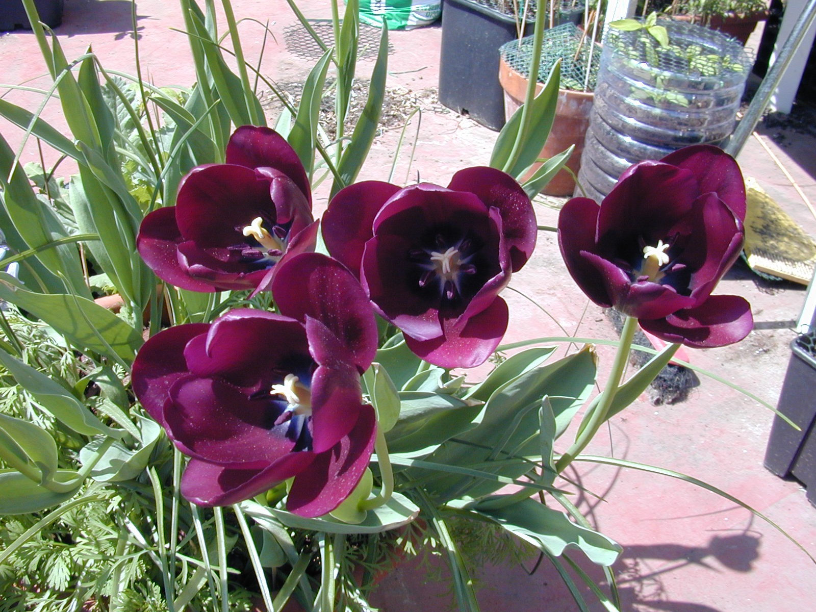 Tulipa